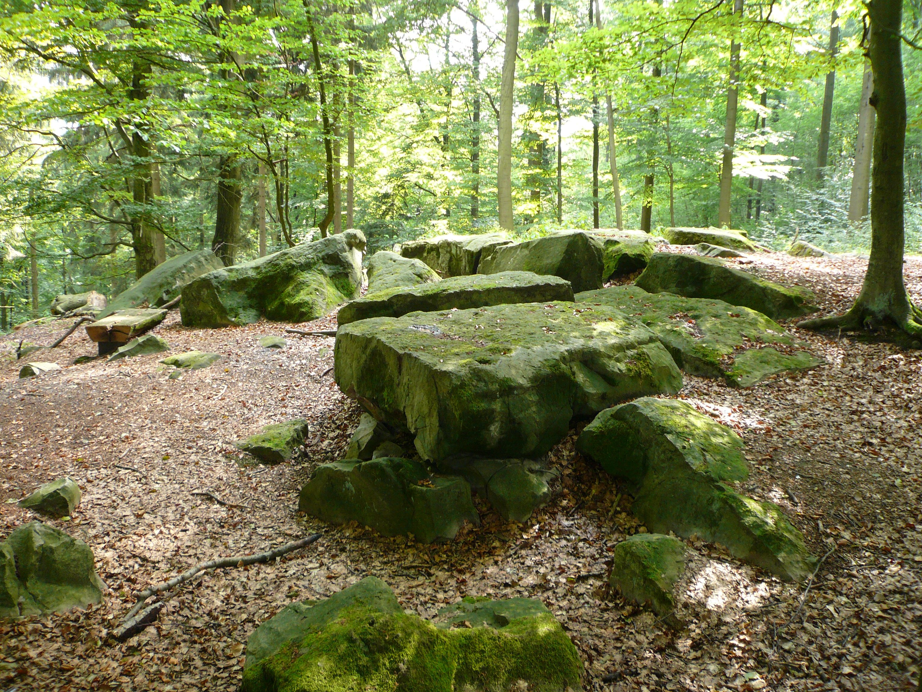 So genannte Altarsteine am Hengelsberg neben dem Hohen Hagen im Dransfelder Stadtwald, Landkreis Göttingen